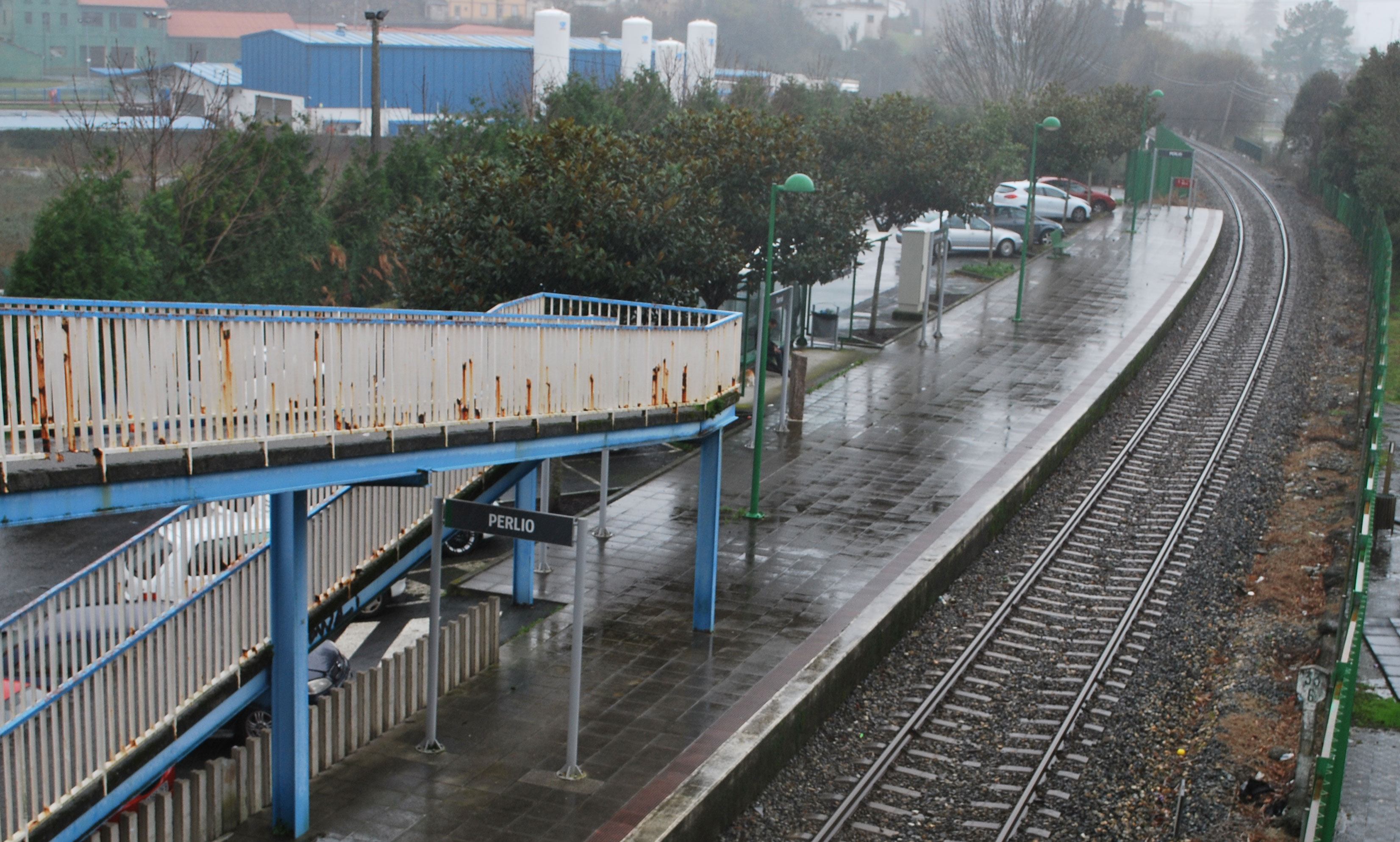 Vista do apeadoiro de Perlío en Fene, A Coruña Galiza Spain